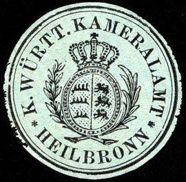 Sealing stamp Title: Königlich Württembergisches Kameralamt - Heilbronn Description: Briefsiegel, blaugrau, schwarz Place: Heilbronn size: 3 cm